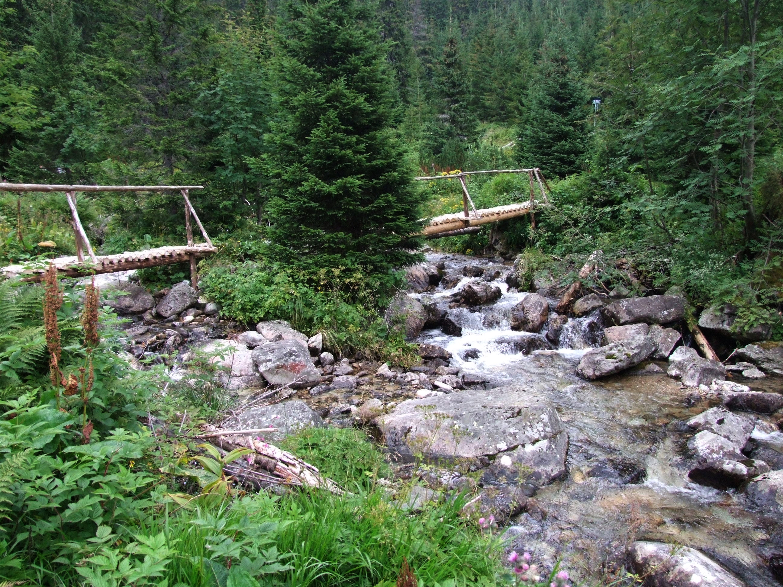 Jamnicki Potok powyżej rozdroża Zahradki